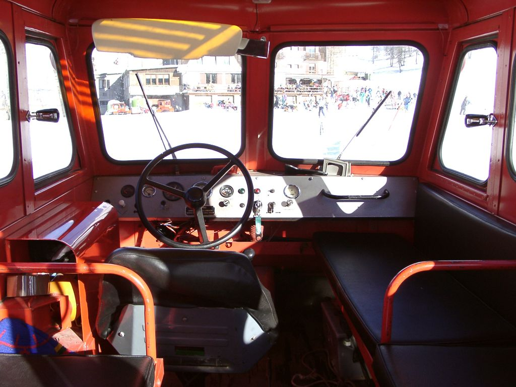 Snow-Trac Kettenfahrzeug Innenansicht Hersteller: AB Westeråsmaskiner (Schweden)